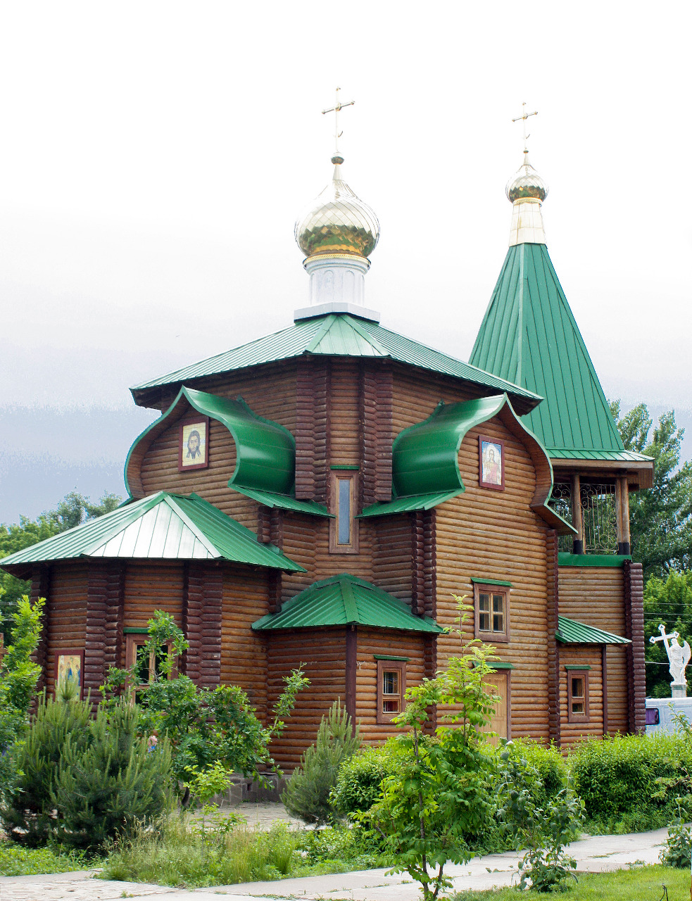 Храм Святой Живоначальной Троицы в Дубовке